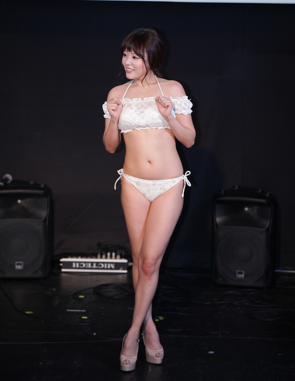 하마사키 마오(Mao Hamasaki) 팬미팅